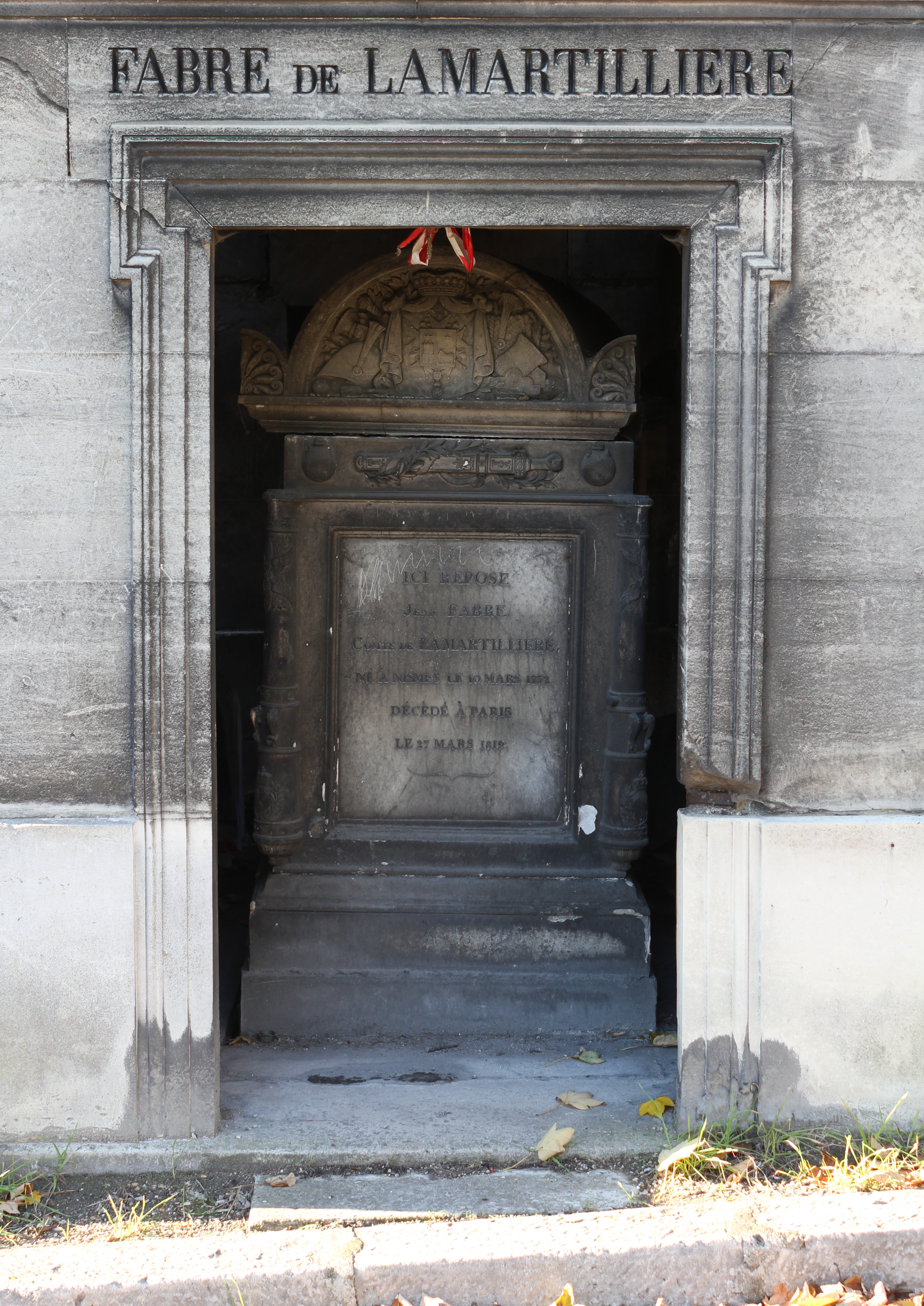 Face avant